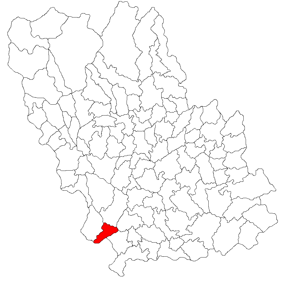 Categorie:Hărţi ale judeţului Prahova